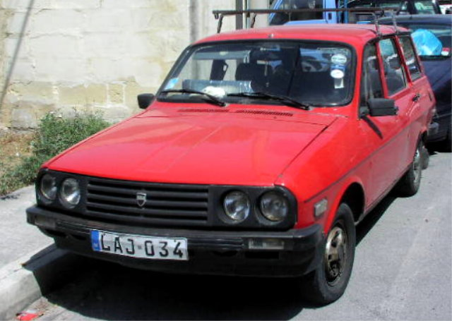 Dacia 1310 Estate